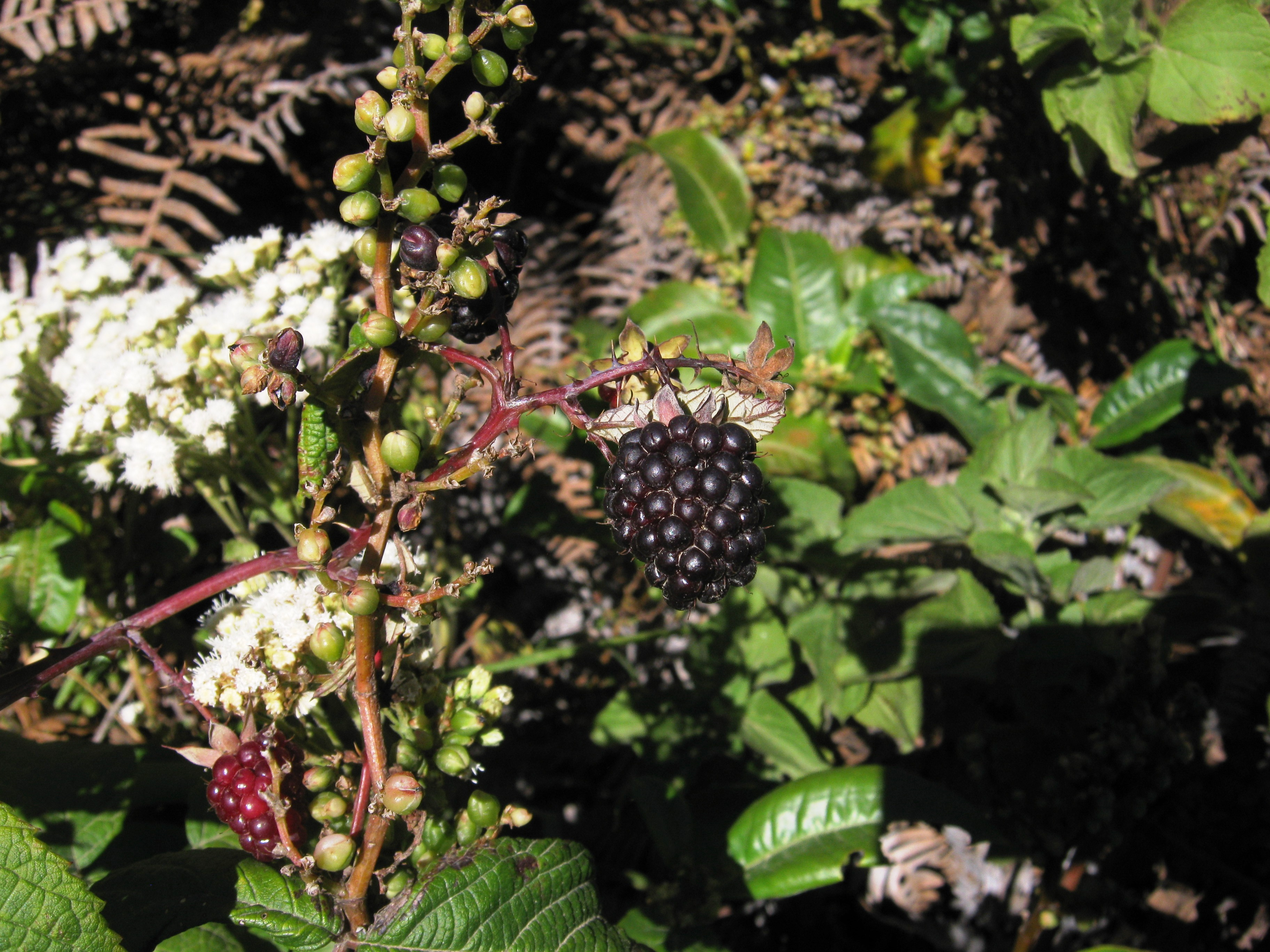 Fotos tomadas en trinidad, Dota